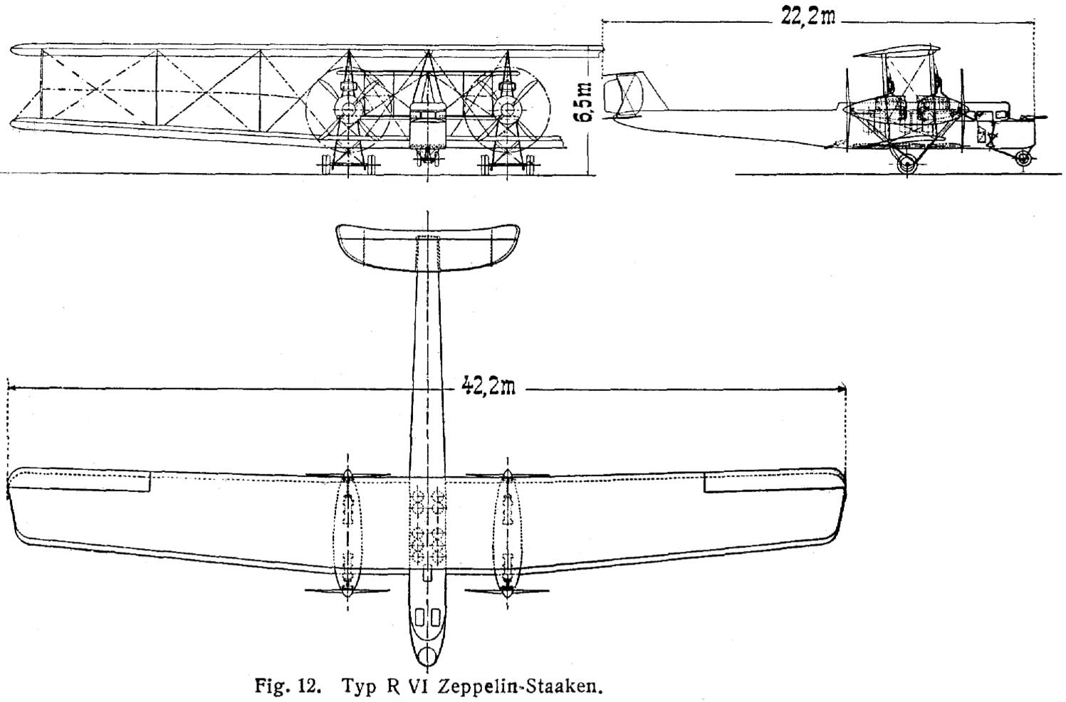 Zeppelin (Staaken) R.VI - Abmessungen